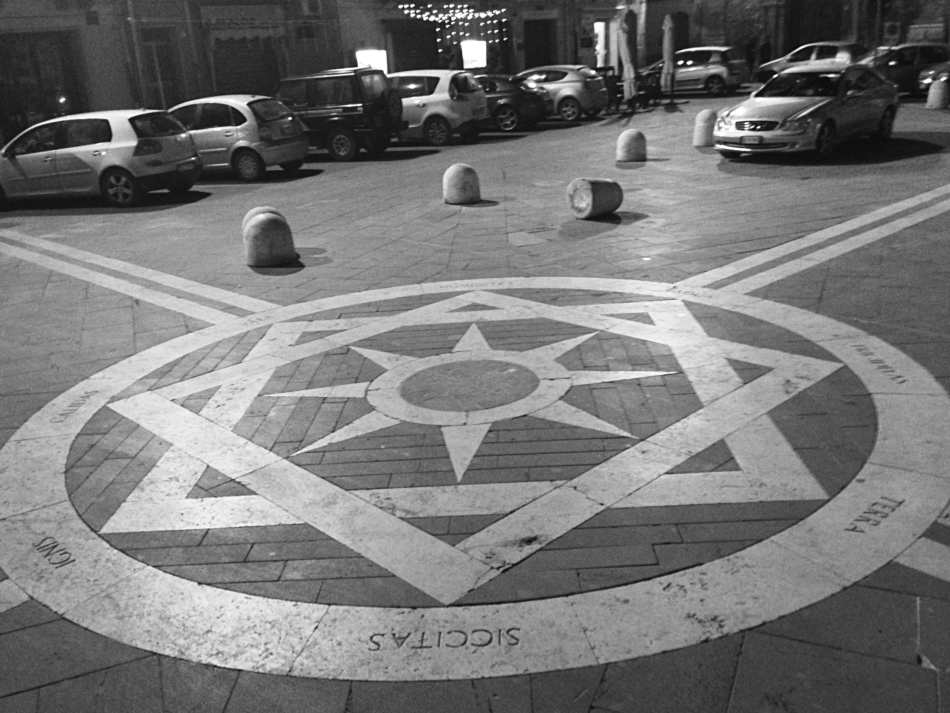 Piazza S. Angelo a Licata